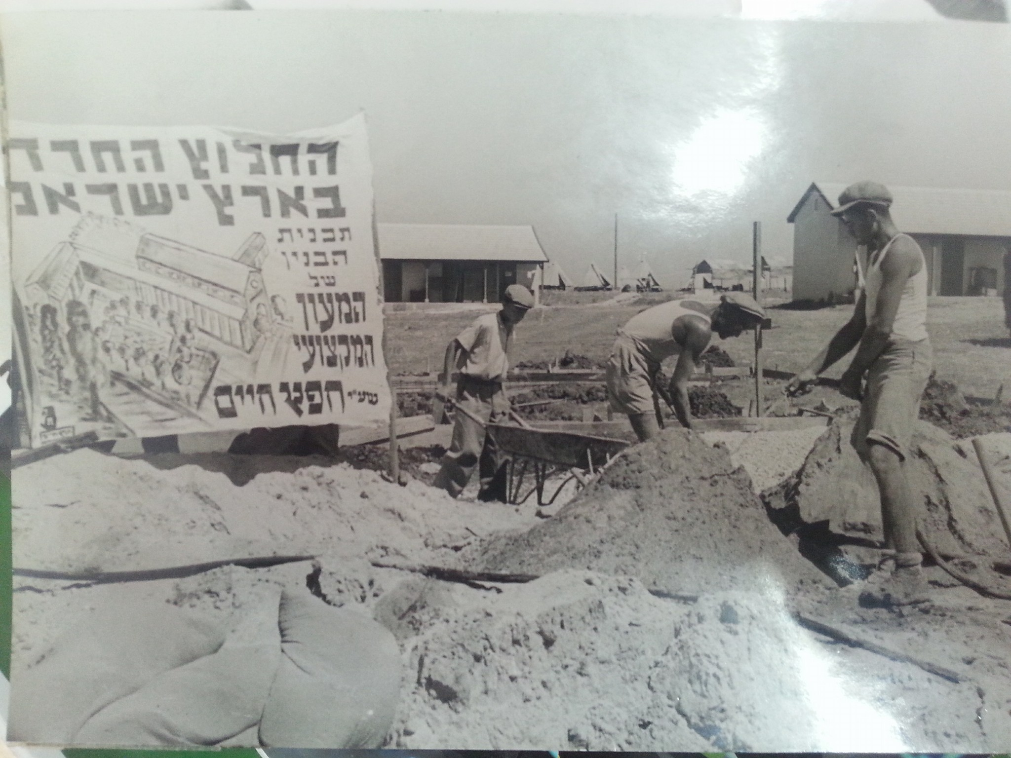 הקמת הישוב חפץ חיים, שלט שמראה שהחלוף החרדי לוקח אחריות על הישוב.